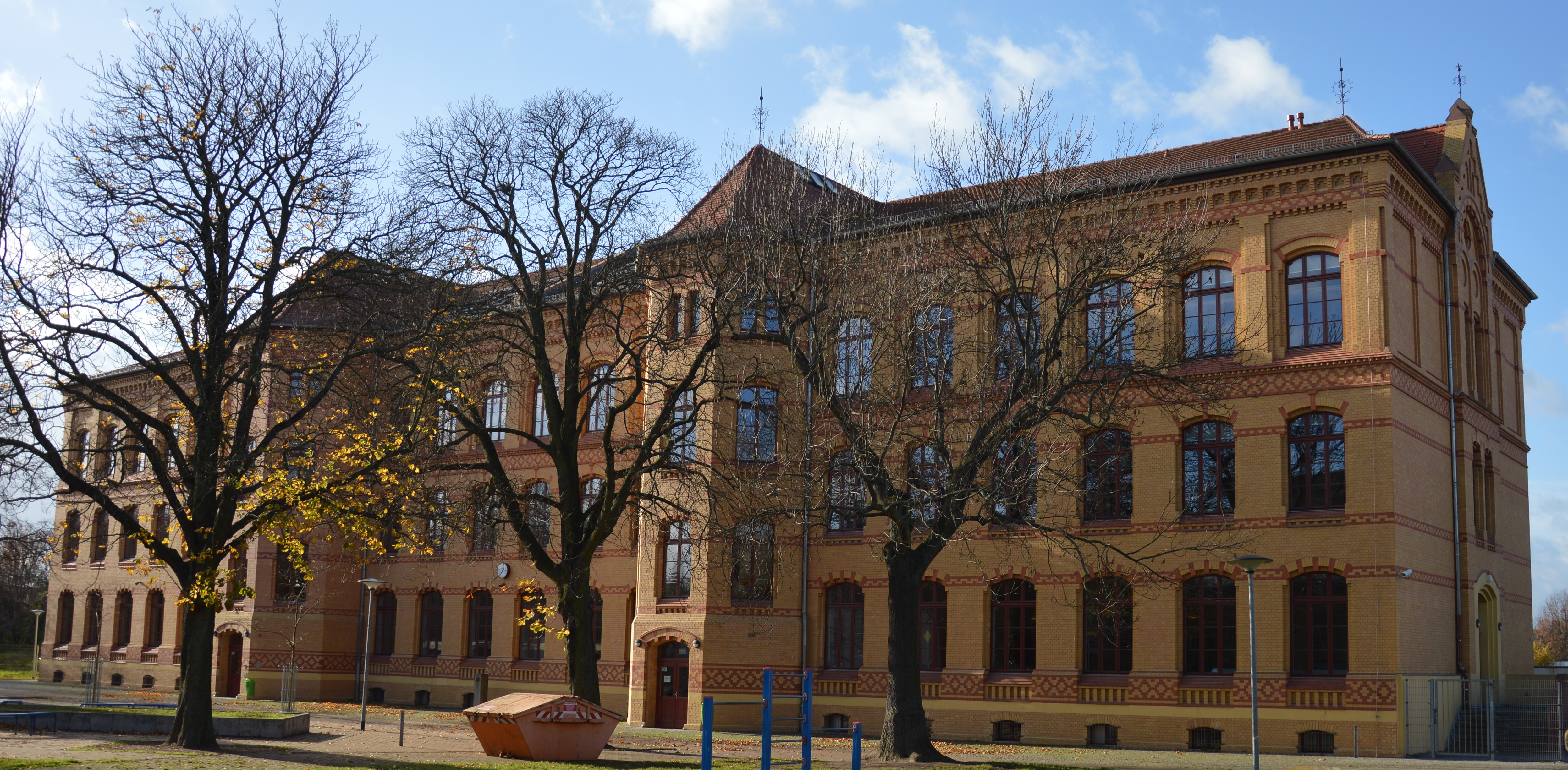 Umfassungsstraße 76a in Magdeburg